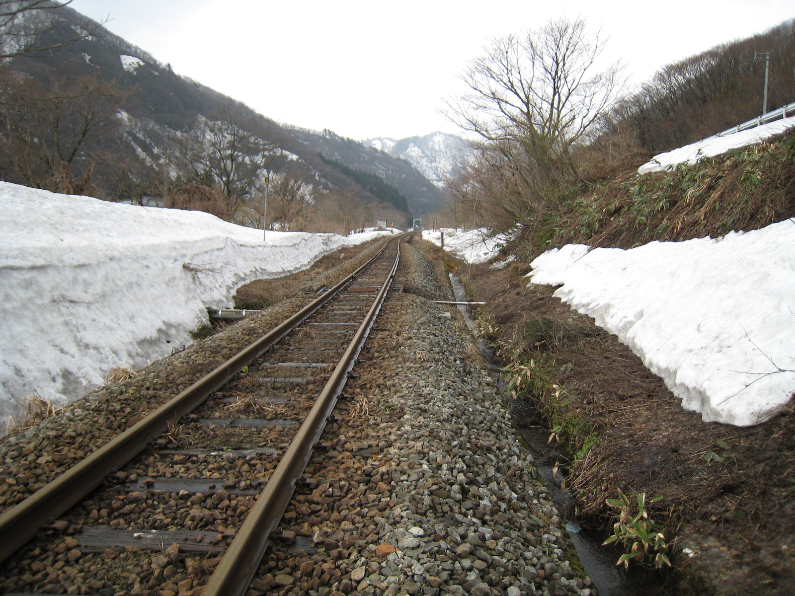 米坂線・旧玉川口駅構内（小国方、分岐跡手前から撮影）